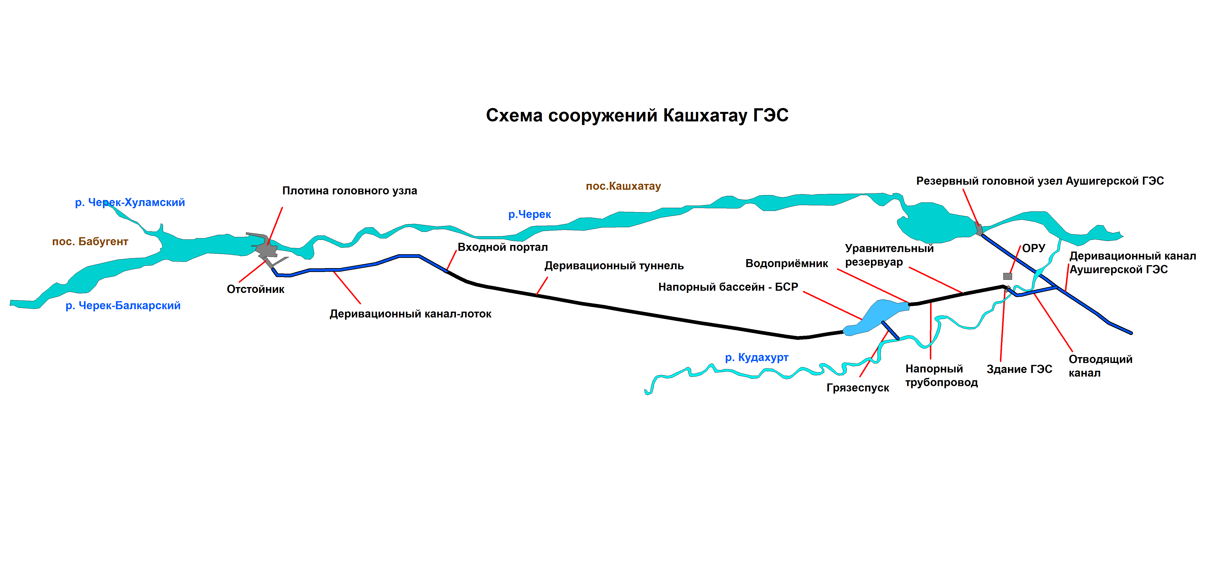 Схема сооружений Кашхатау ГЭС, на базе